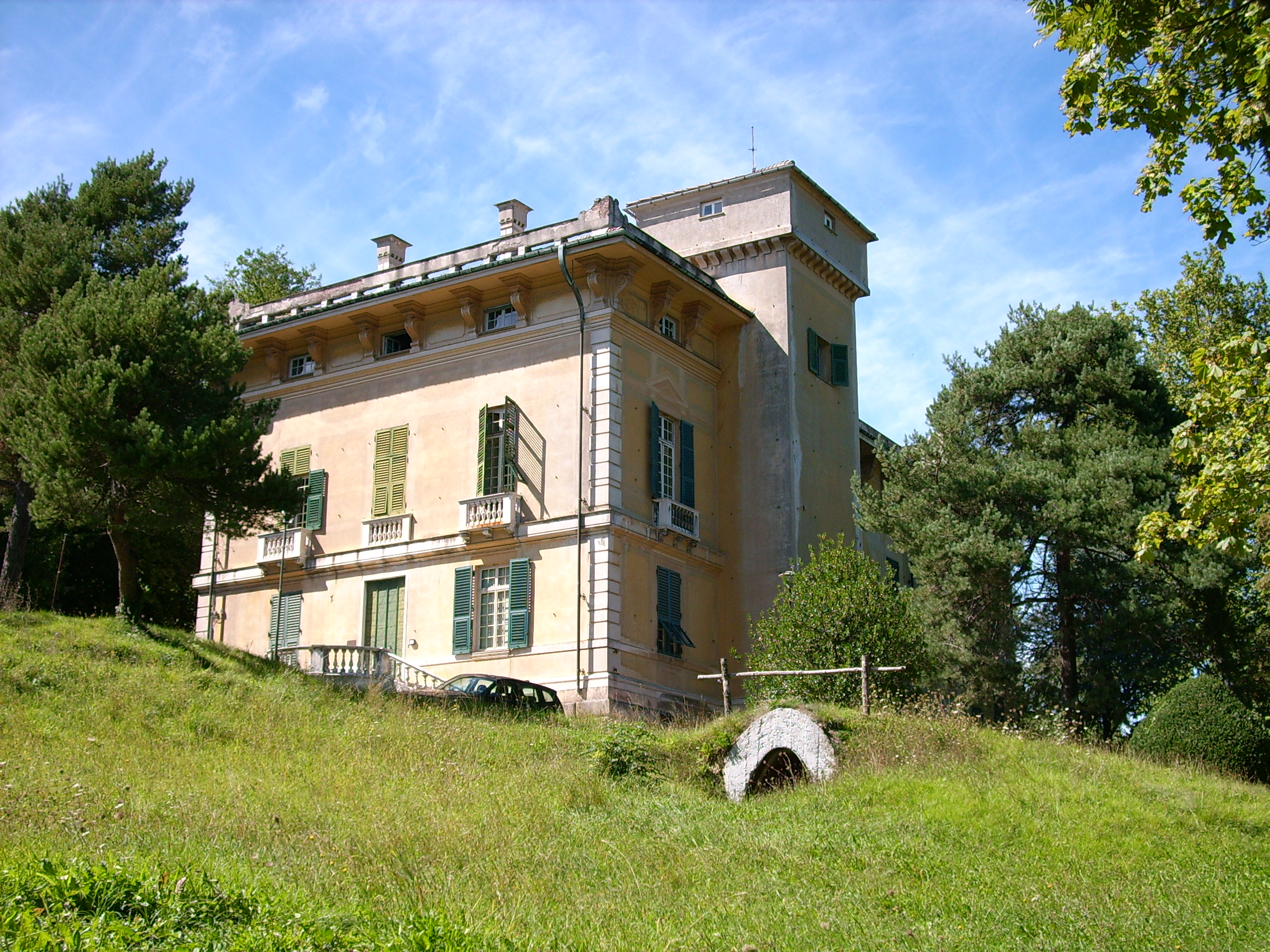 Villa Borzino di Busalla, Liguria, Italia